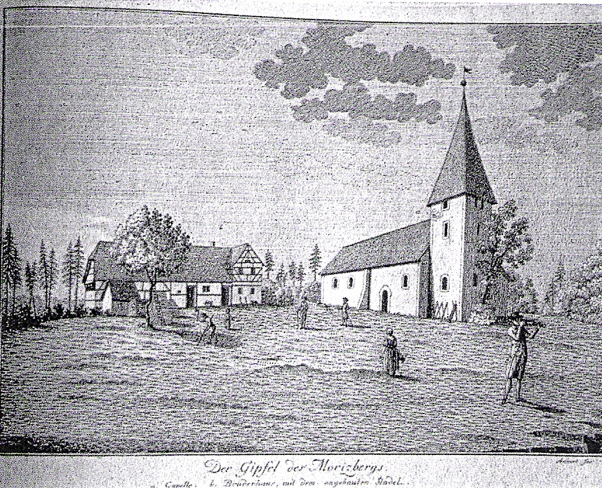 St. Mauritz/Moritzberg